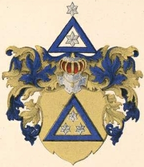 Peetzi suguvõsa aadlivapp